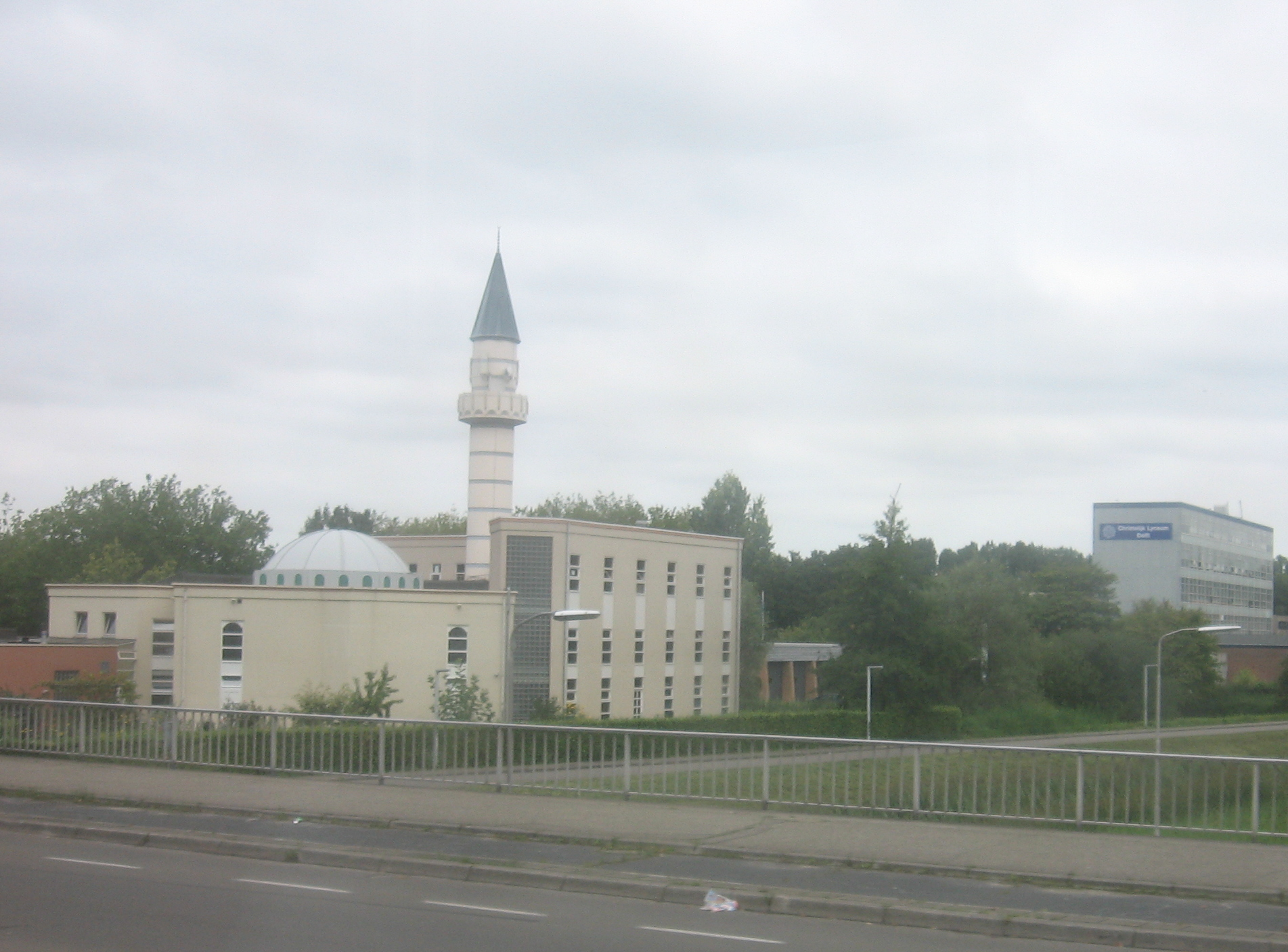 Sultan Ahmet Moskee Delft